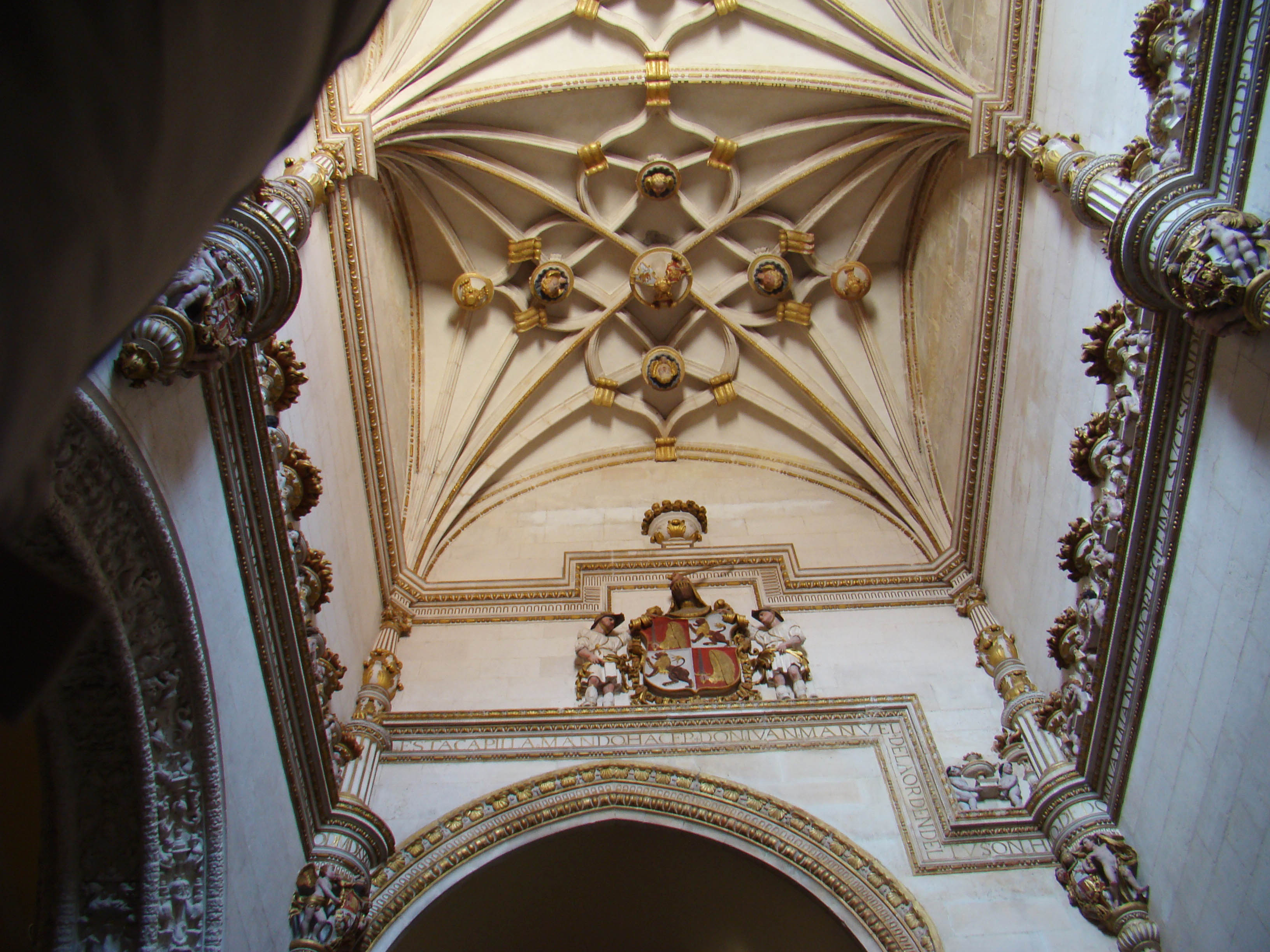 Iglesia del convento de San Pablo en la localidad de Peñafiel en Valladolid, España. Bóveda de la capilla llamada de los Manuel de estilo plateresco.